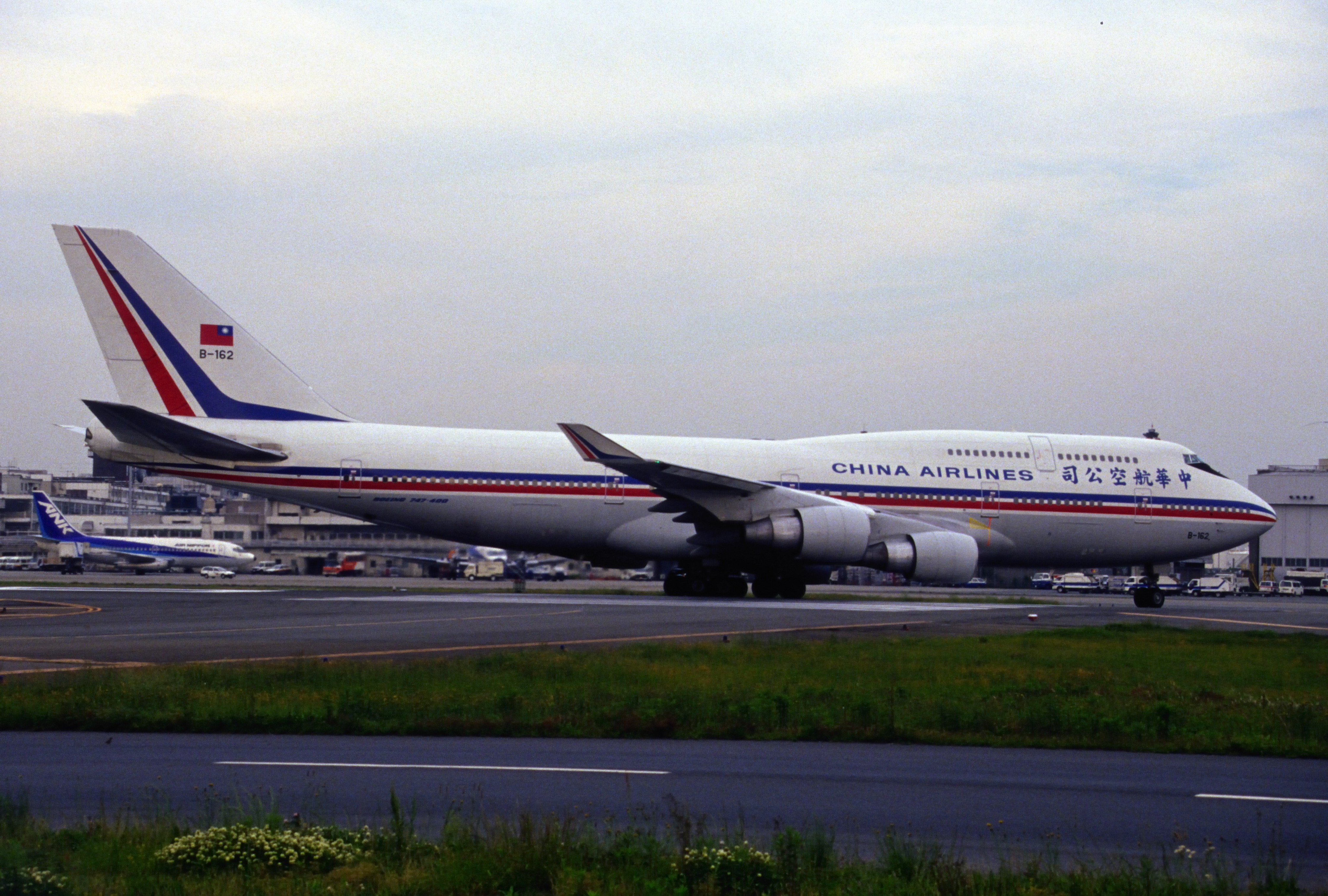 CHINA AIRLINES B747-409 (B-162/24310/778)